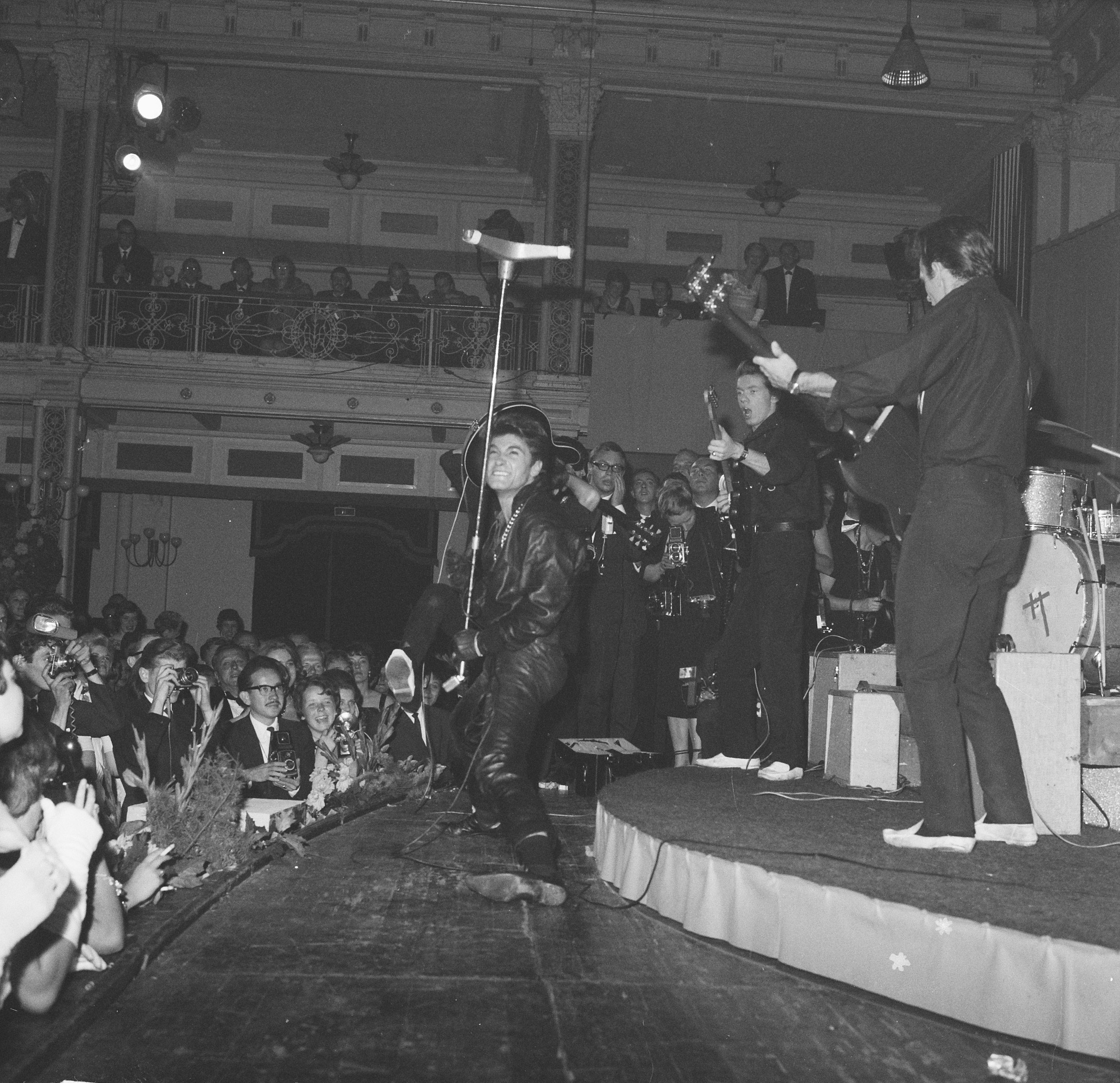 Grand Gala du Disque. Vince Taylor and the Playboys.